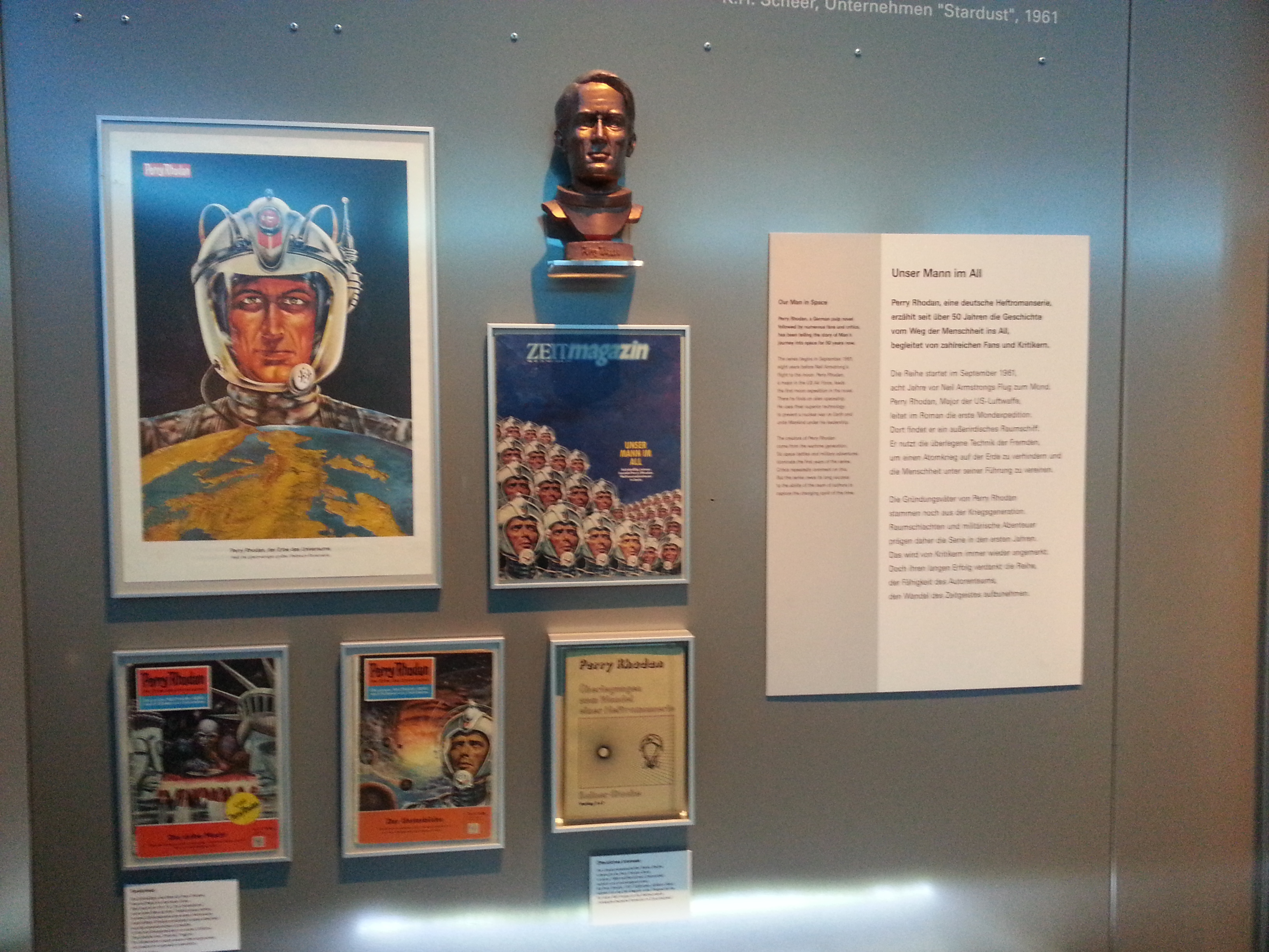 Ausstellung SF in Deutschland in Leipzig 2013